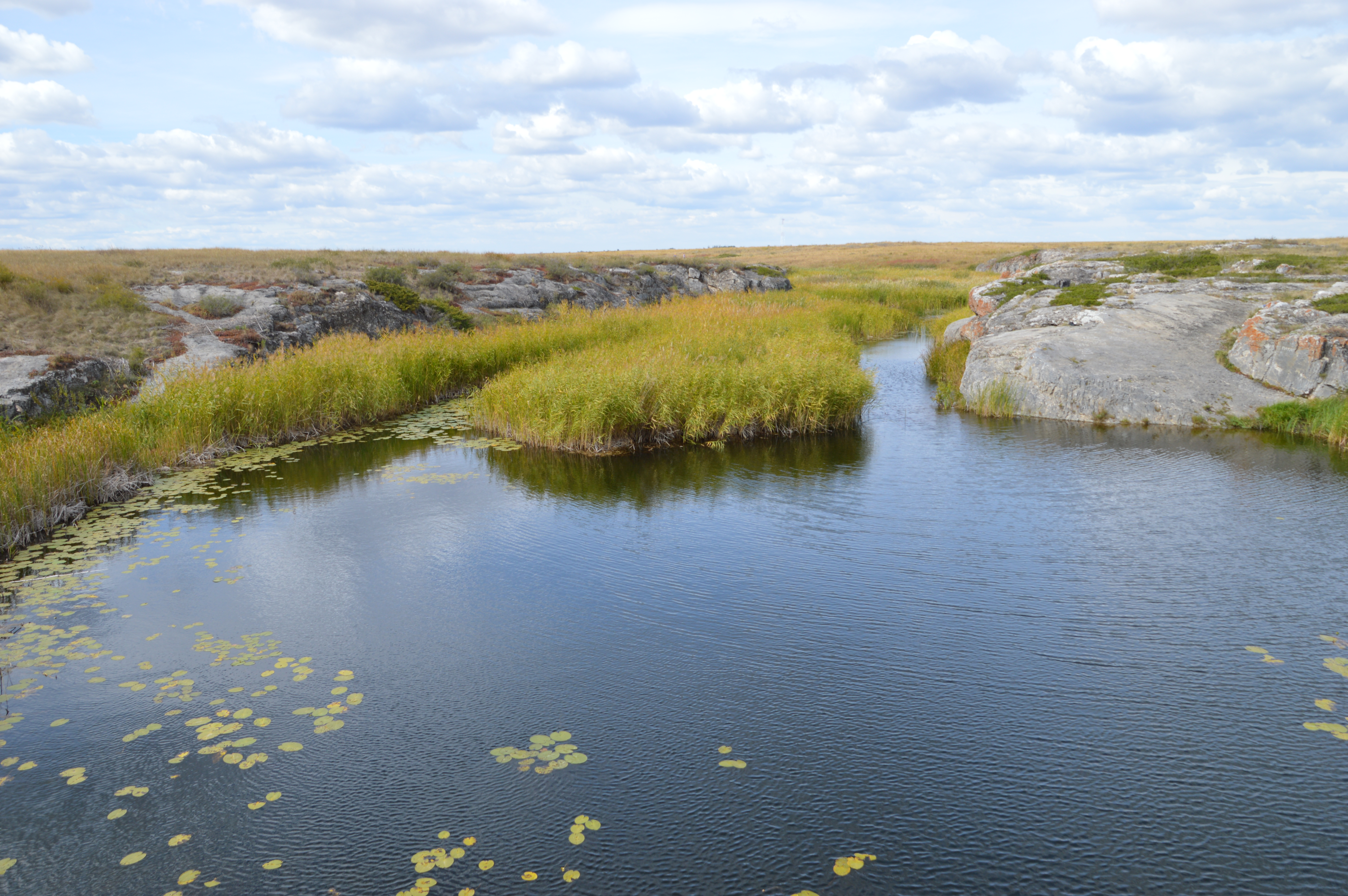 Ручей Ширяев лог, Карталинский район This image is related to the protected area of Russia number 7410114